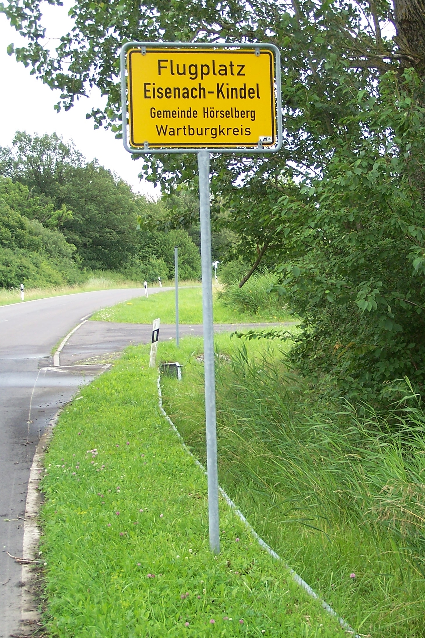 Das amtliche Ortsschild des Flugplatzgeländes.